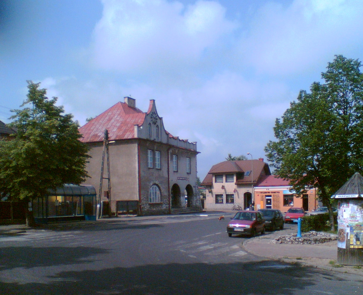 Olsztyn k / Częstochowy